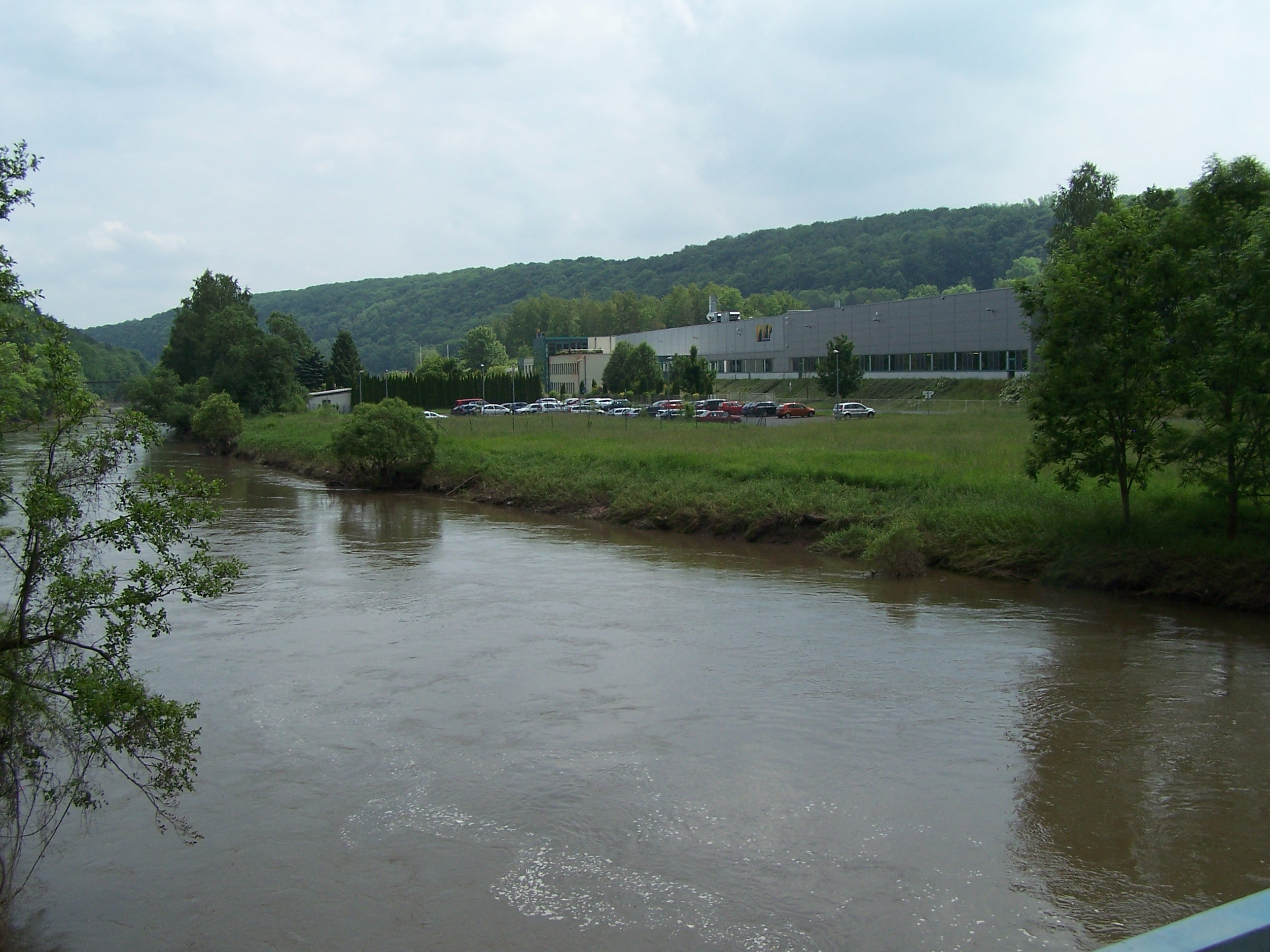 Die Firma ATP in Buchenau - Ortsteil von Mihla.